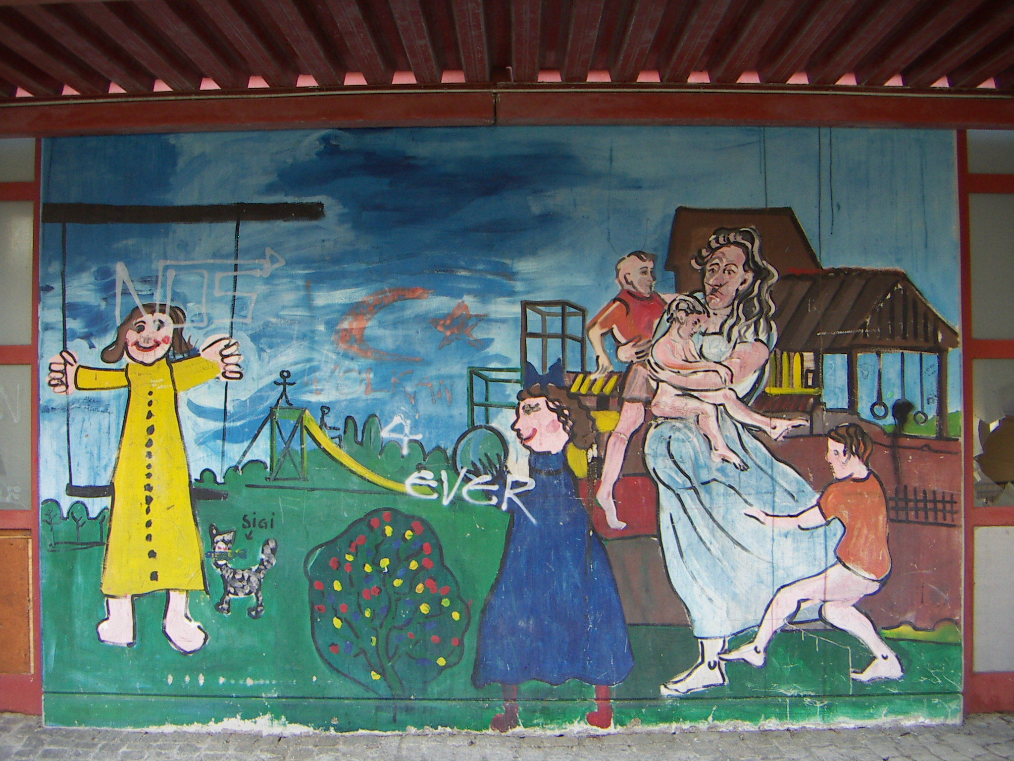 Stadt des Kindes, Wien Penzing, Architekt Anton Schweighofer, Sozialpädagogisches Konzept: Maria Jacobi, Gesiba 1969-1974, Bauherr: Kuratorium für Wiener Jugendheime